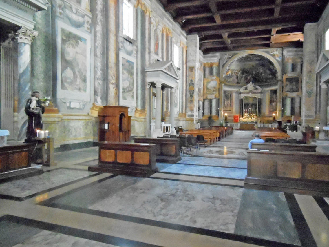 Roma, chiesa di San Vitale (via Nazionale), interno a navata unica